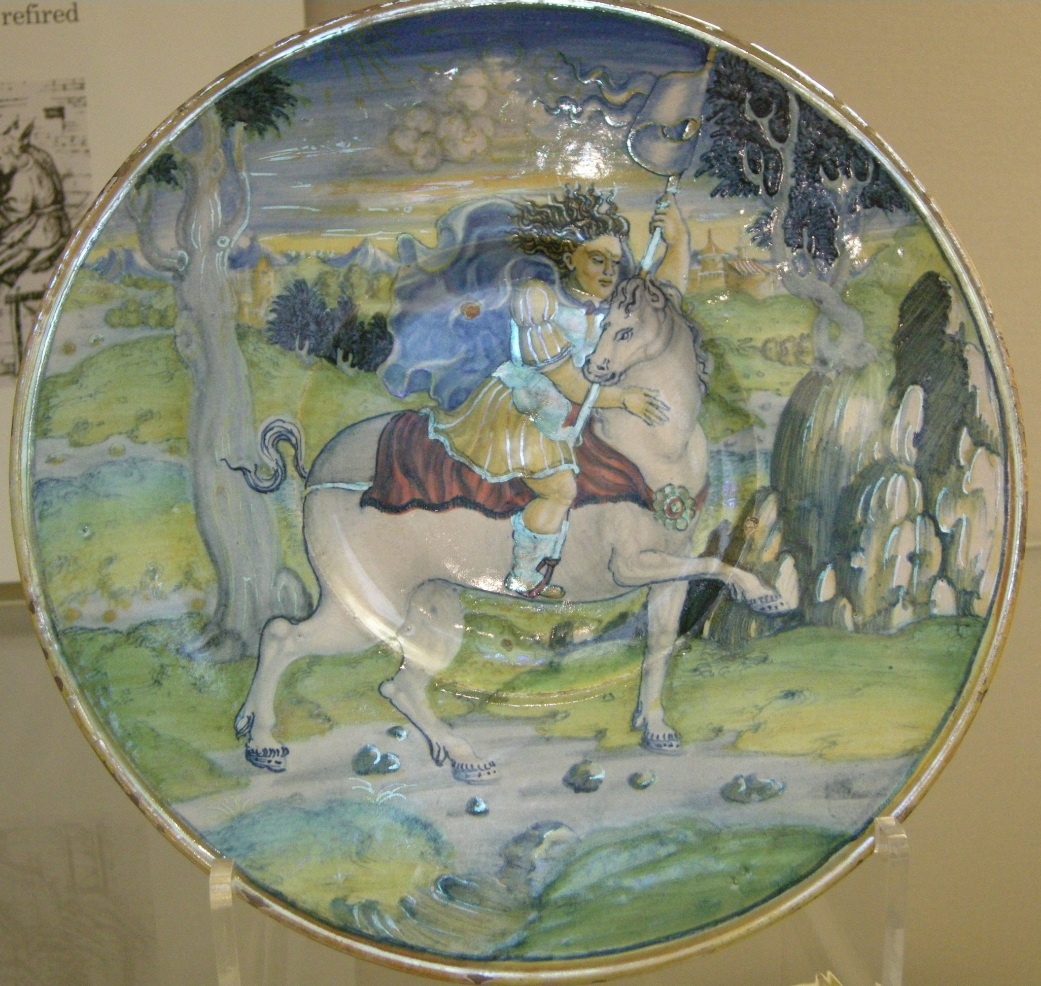 Maestro giorgio di gubbio, piatto con cavaliere con stendardo, 1525